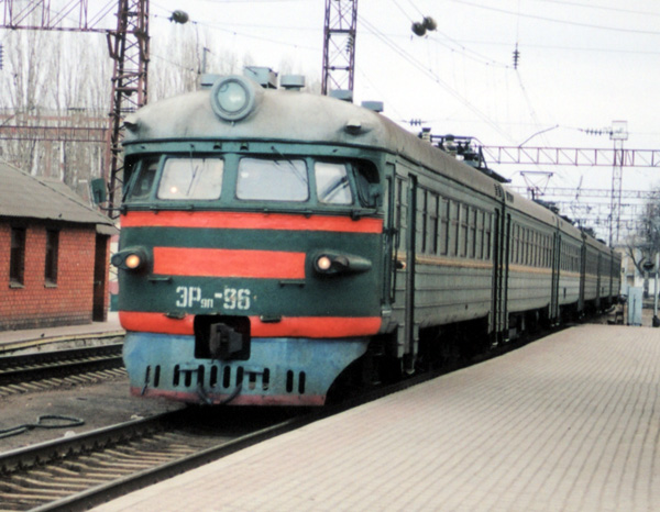 Электропоезд ЭР9п-96 на станции Воронеж